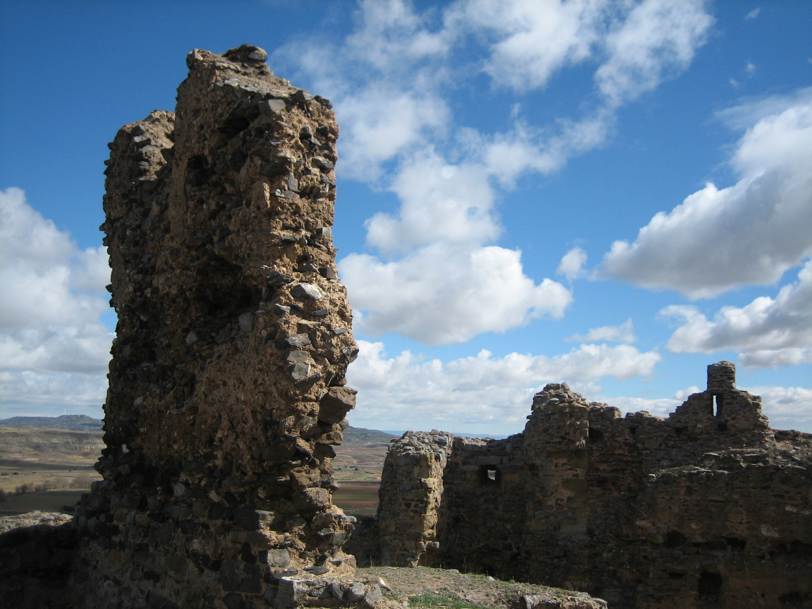 Castillo de Trasmoz, Zaragoza, Aragón